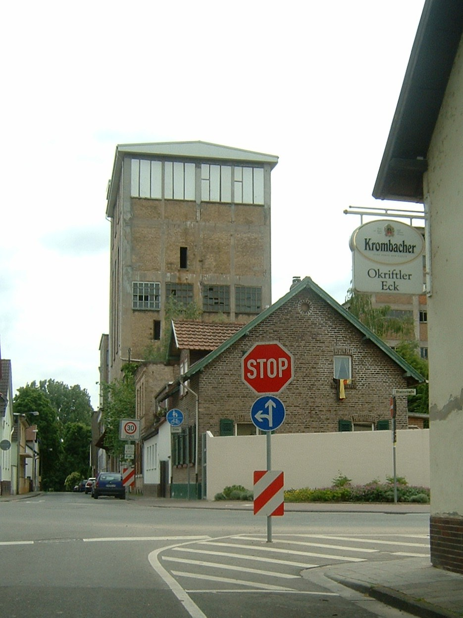 Fabrikgebäude in Okriftel (Hattersheim am Main)